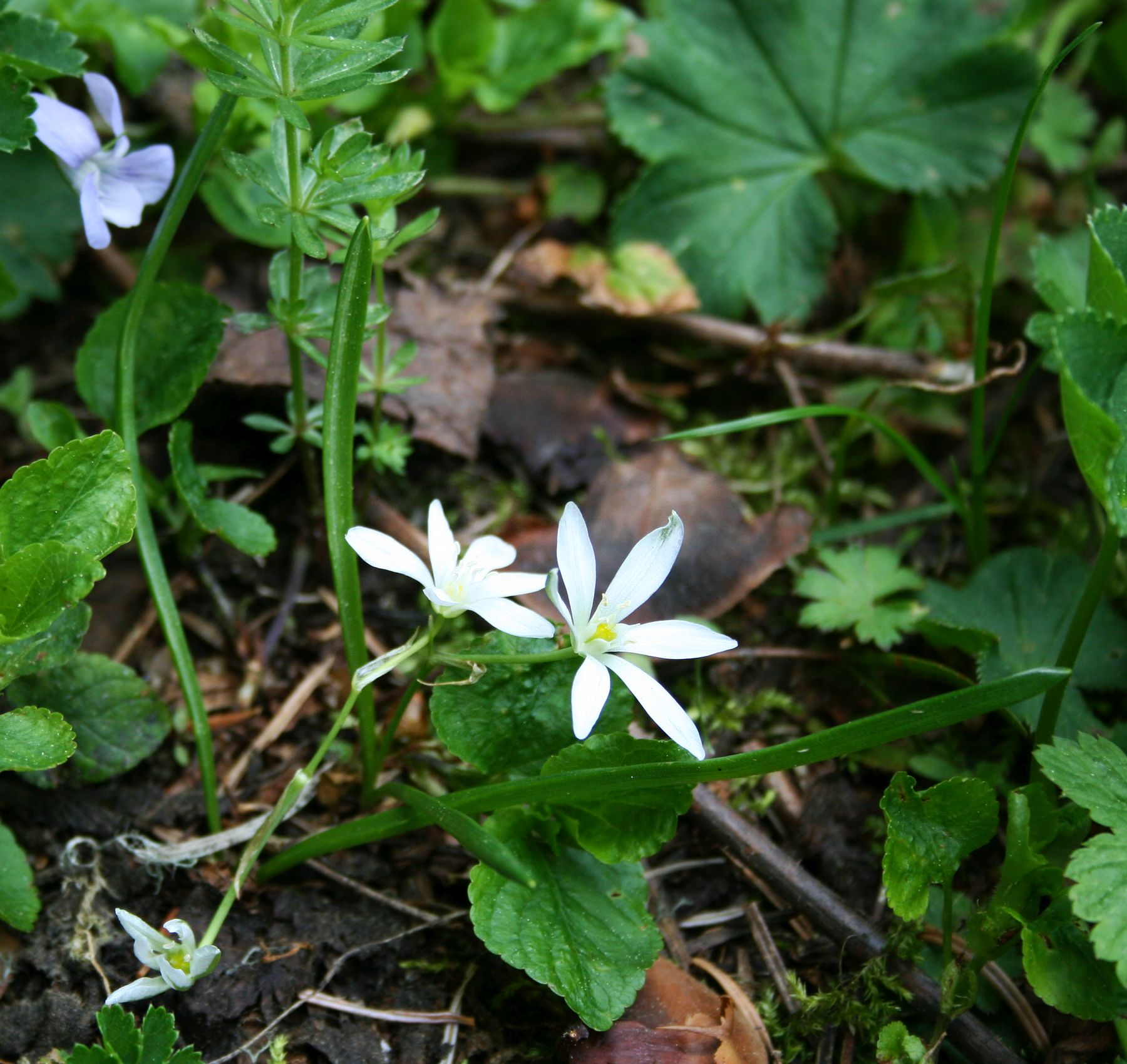 Ornithogalum wiedemannii var. wiedemannii, Spargelgewächse (Asparagaceae), Scilloideae - Türkei/Türkiye/Turkey: Prov. Bolu/Bolu ili, Köroğlu Dağları, 12-13 km S Bolu, ca. 1600 m